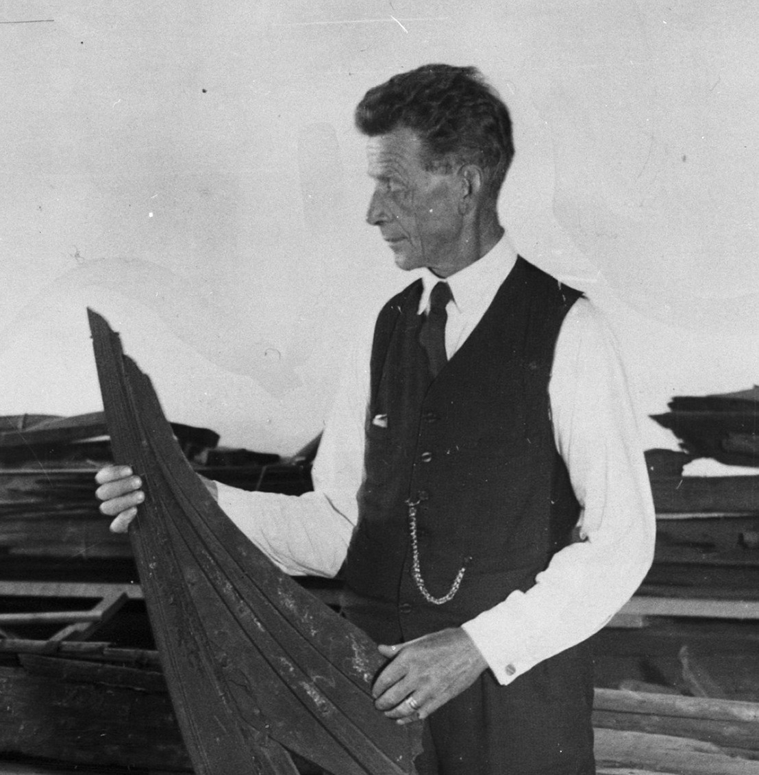 Ing Fredrik Johannessen M/Gokstad små båtene i deler ca. 1936-38